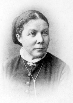 Marie Walden, alias Marie Henriette Rüetschi-Bitzius (1834-1890), Tochter von Jeremias Gotthelf